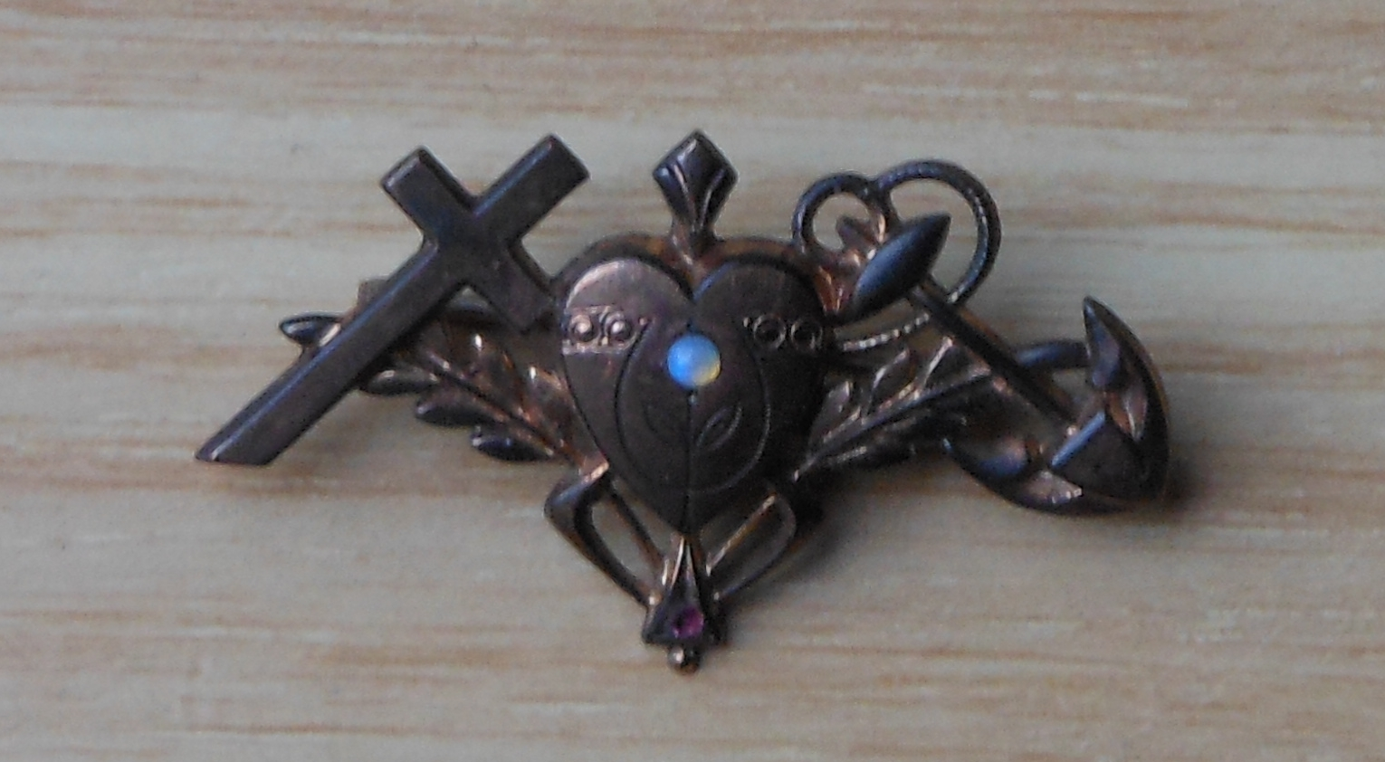 Brosche mit dem als "Seemannsgrab" bekannten Motiv bestehend aus Kreuz, Herz und Anker.